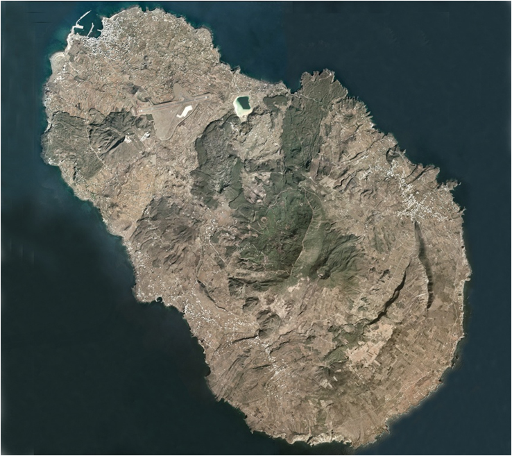 Luftbild Insel Pantelleria